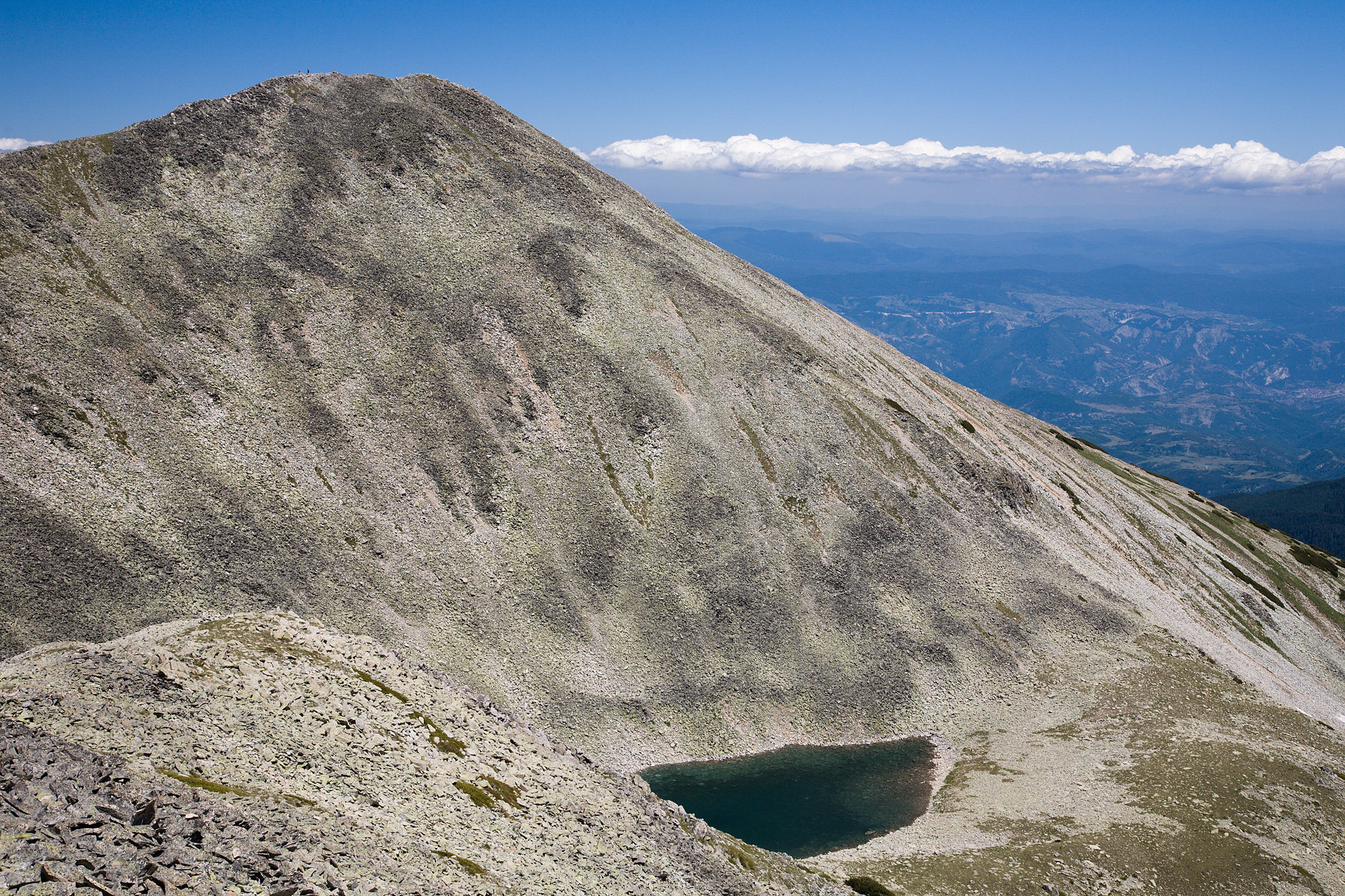 Пирин, Пирин, Полежанското езеро